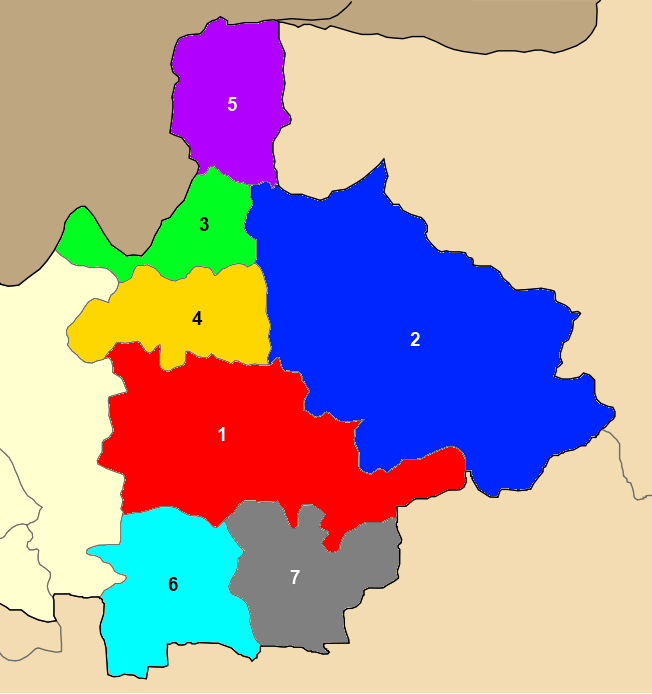 Χάρτης των ενοτήτων (και πρώην δήμων) από τις οποίες αποτελείται ο Δήμος Κιλκίς